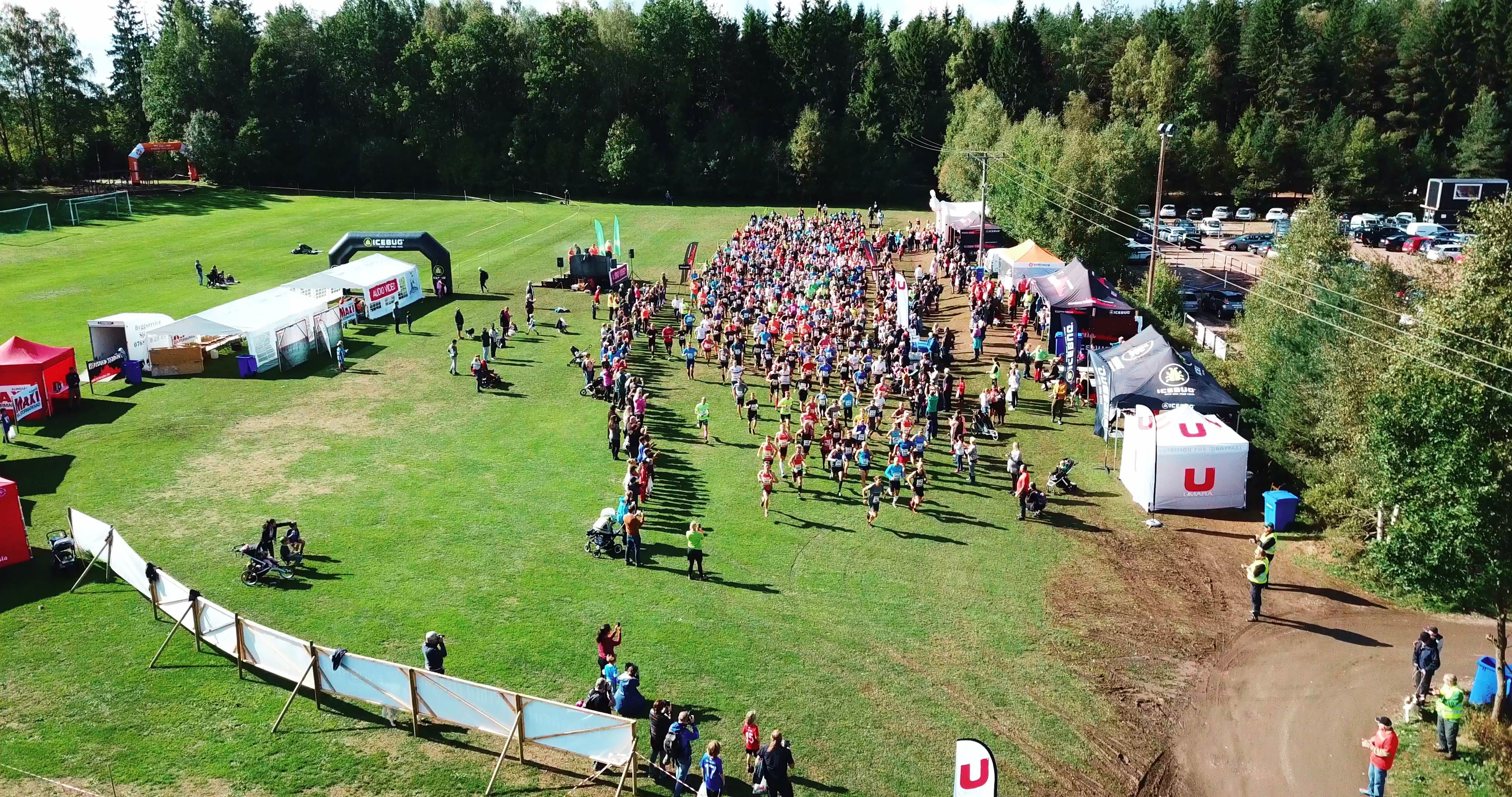 Starten tävling 2018